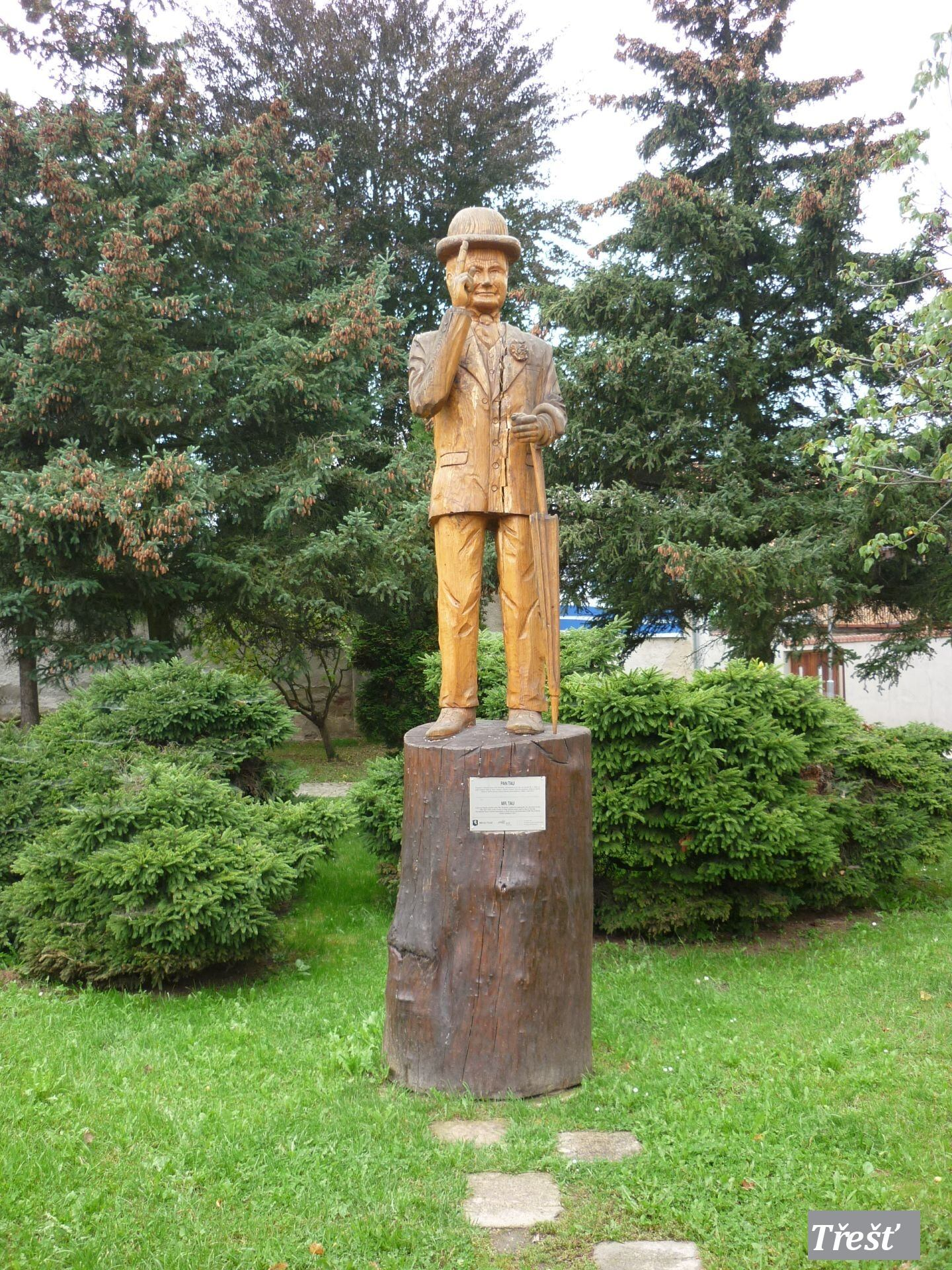 Sochy v Třešti - Pan TAU